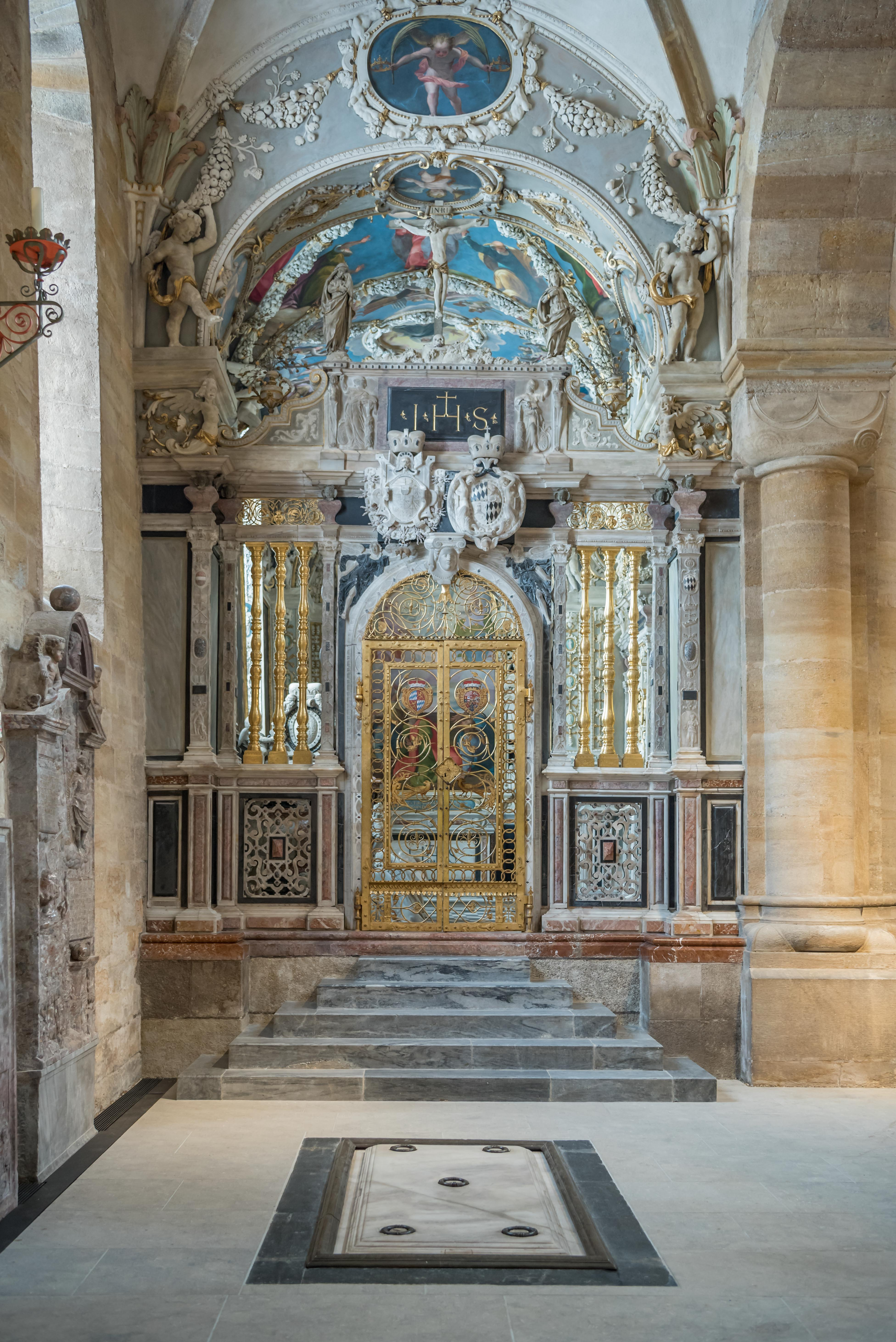 © Michael Regner